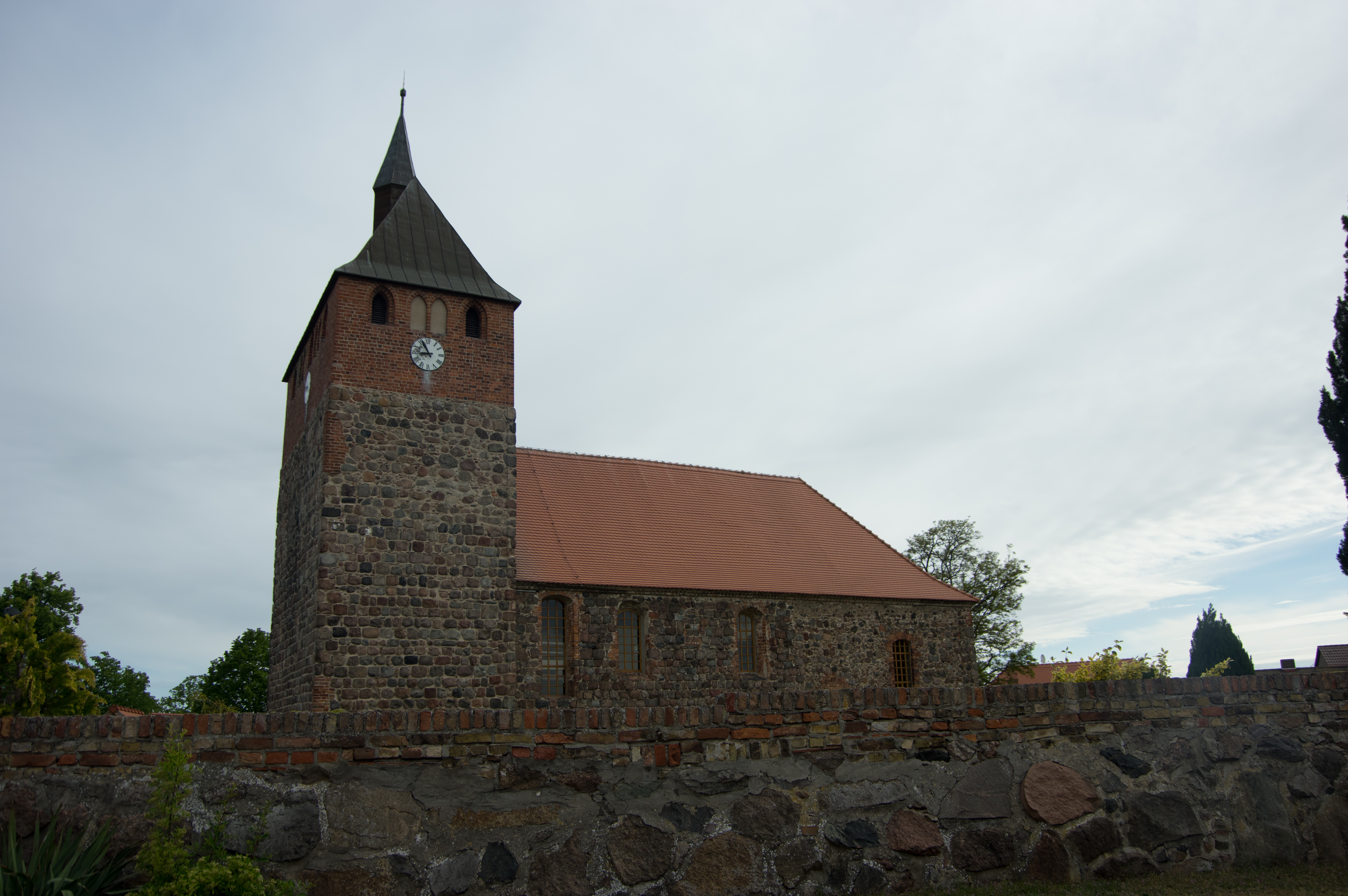 Linthe in Brandenburg. Die Dorfkirche steht unter Denkmalschutz.